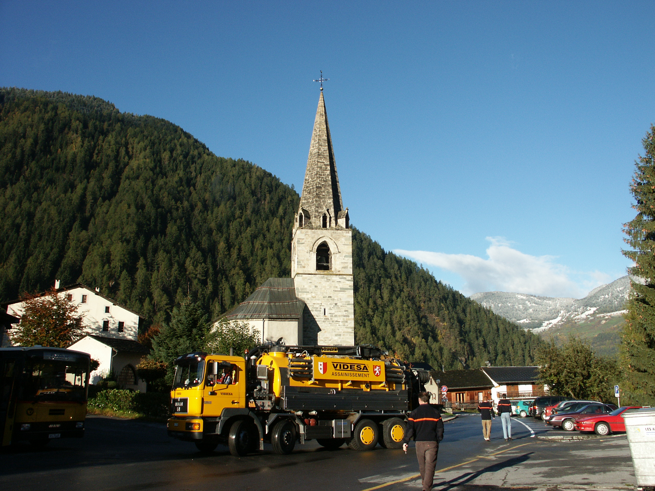 Eglise du Châble